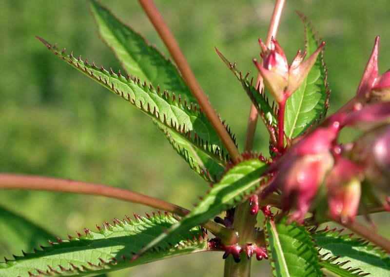 Impatiens glandulifera, Königstein, Taunus, Deutschland (Germany)